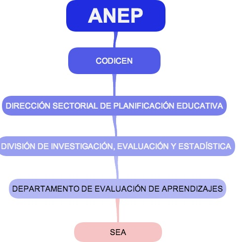 ORGANIGRAMA